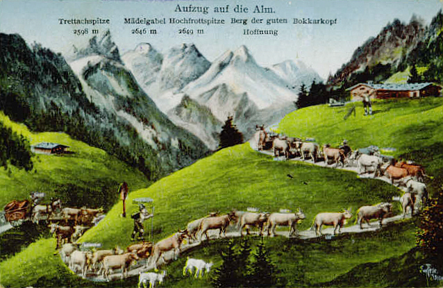 Ansichtskarte, gelaufen 1929